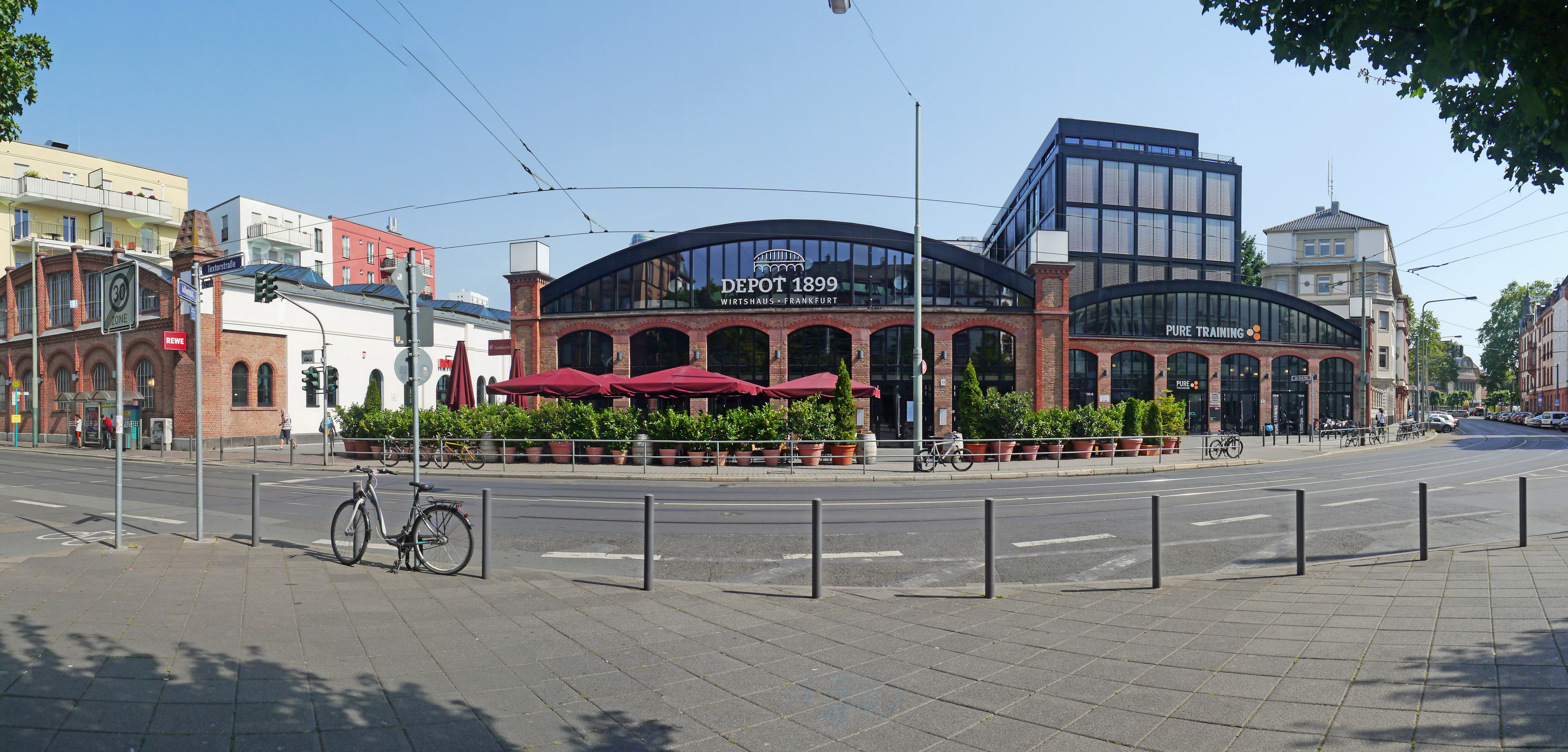 Das Sachsenhäuser Depot, am Karl-Gerold-Platz in Frankfurt-Sachsenhausen. Es wurde nach der Stilllegung und dem Umbau, ab 2009 als Stadtteilzentrum genutzt. Zwischen 2009 und 2013 hatte darin auch die Redaktion der Frankfurter Rundschau ihren Sitz.